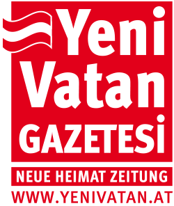 Logo der Yeni Vatan Gazetesi